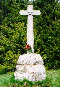 Croix des 3 évèques au tripoint de trois départements: Cantal, Aveyron, Lozère.